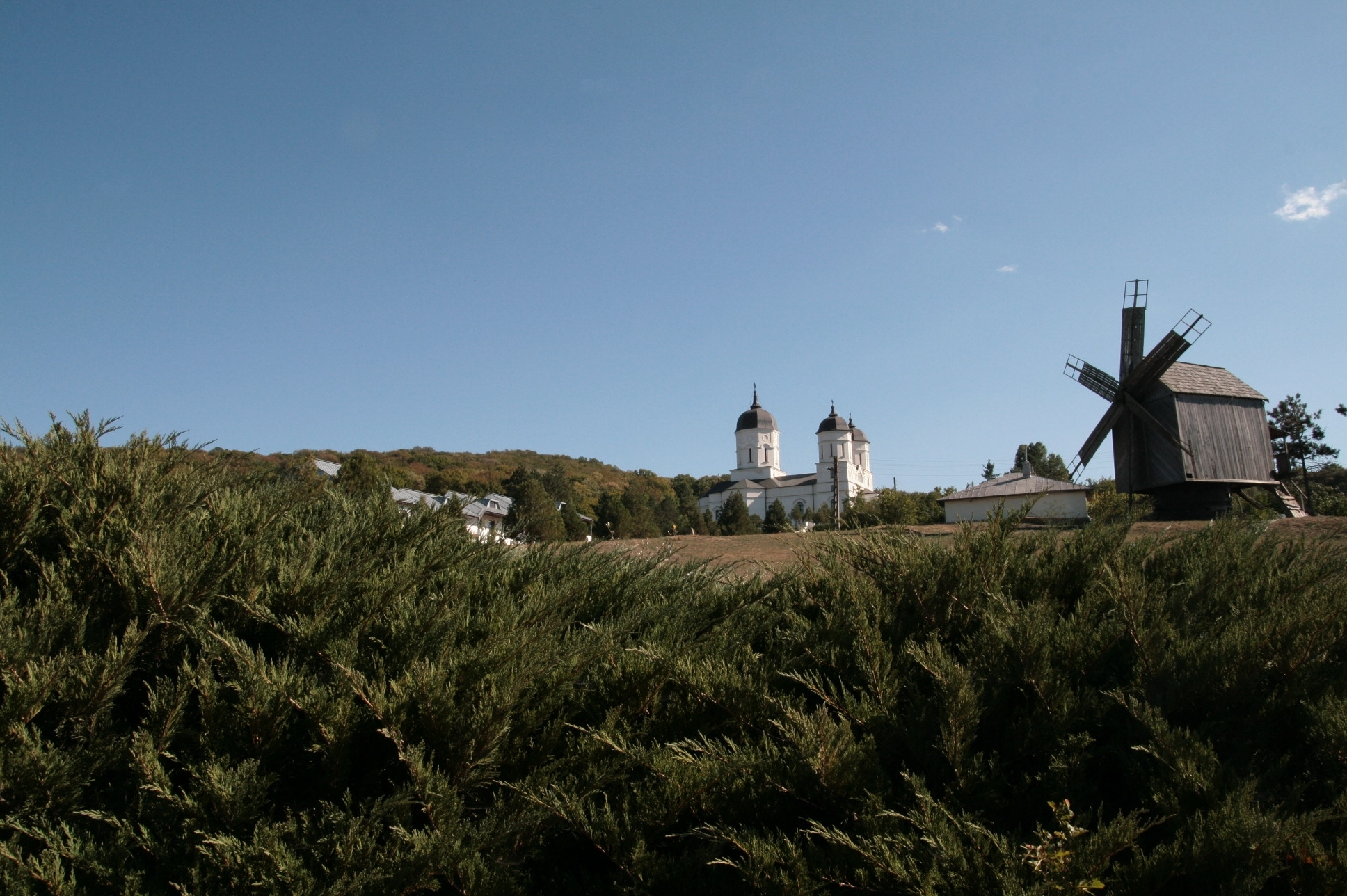 Mănăstirea Celic-Dere